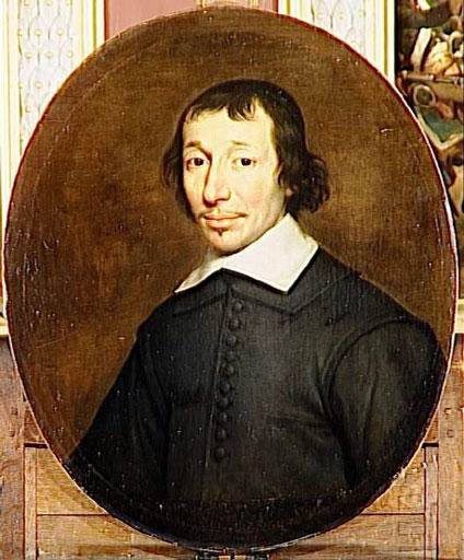 Portrait of Louis Isaac Le Maistre de Sacy (1613-1684)